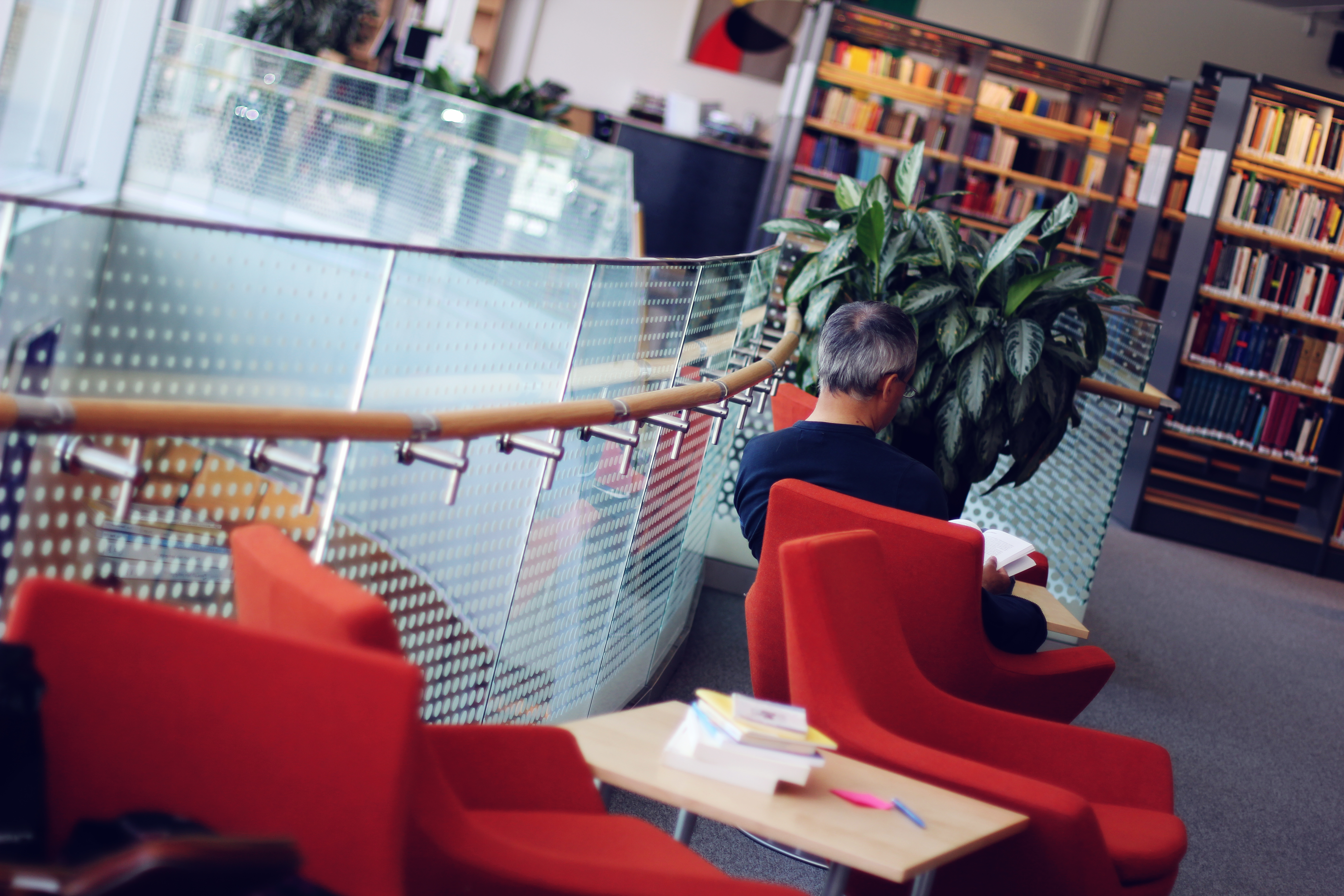 Interiörbild från ämnesbiblioteket Blåsenhusbiblioteket inom Uppsala universitet